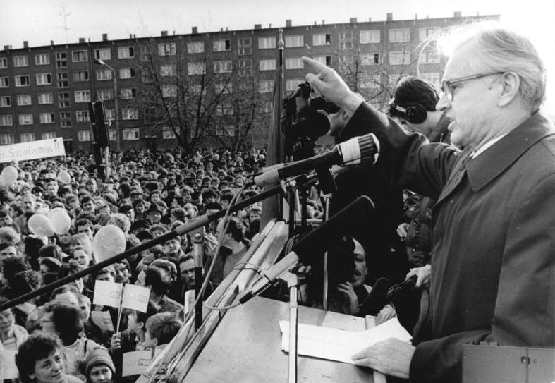 ADN-ZB Settnik 13.3.90 Bez. Neubrandenburg: Fünf Tage vor der DDR-Volkskammerwahl hatte der für die PDS kandidierende Ministerpräsident Hans Modrow seinen ersten Wahlkampfauftritt. In Demmin sprach er sich auf einer Kundgebung gegen eine deutsche Vereinigung nach Artikel 23 des BRD-Grundesetzes aus. Seine Rede wurde teilweise, vor allem von Anhängern der SPD und DSU, niedergeschrien und von Pfiffen und Buh-Rufen begleitet.